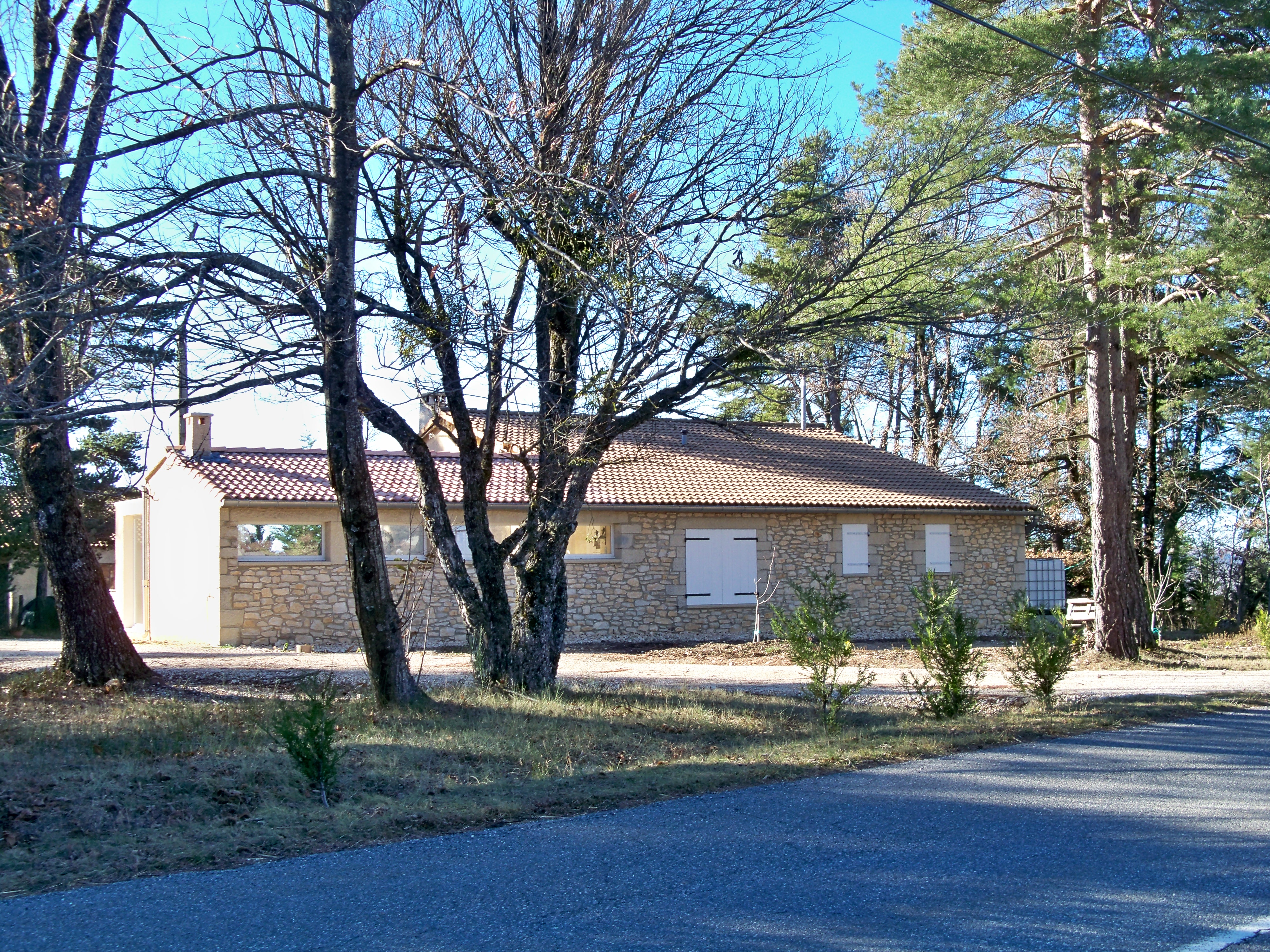 Gîte rural à Revest du Bion (04)